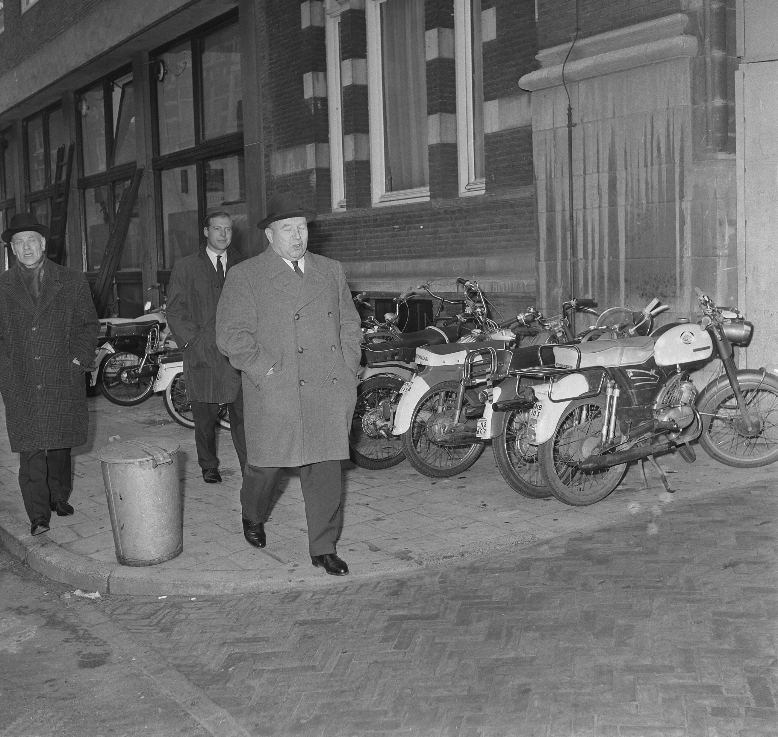 Collectie / Archief : Fotocollectie Anefo Reportage / Serie : [ onbekend ] Beschrijving : Freiherr Julius von dem Busche bij Paleis, aankomst Datum : 8 maart 1966 Trefwoorden : aankomsten, paleizen Fotograaf : Voets, Jan / Anefo Auteursrechthebbende : Nationaal Archief Materiaalsoort : Negatief (zwart/wit) Nummer archiefinventaris : bekijk toegang 2.24.01.04 Bestanddeelnummer : 918-8667